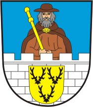 Znak obce Staňkov (okres Domažlice)